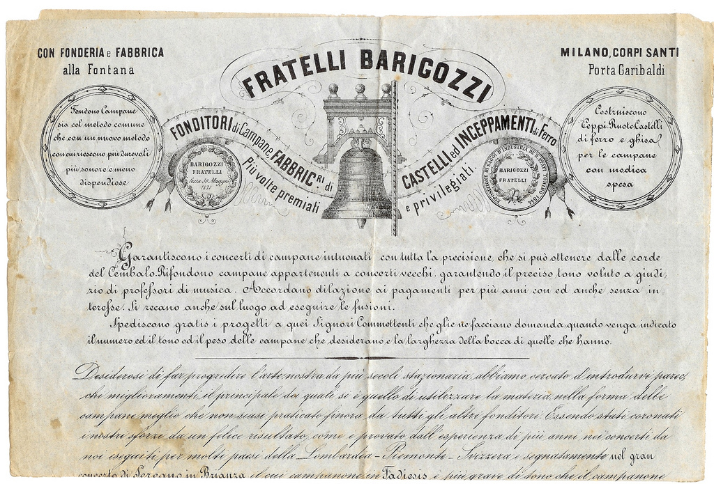 Documento pubblicitario che illustra il "metodo Barigozzi".